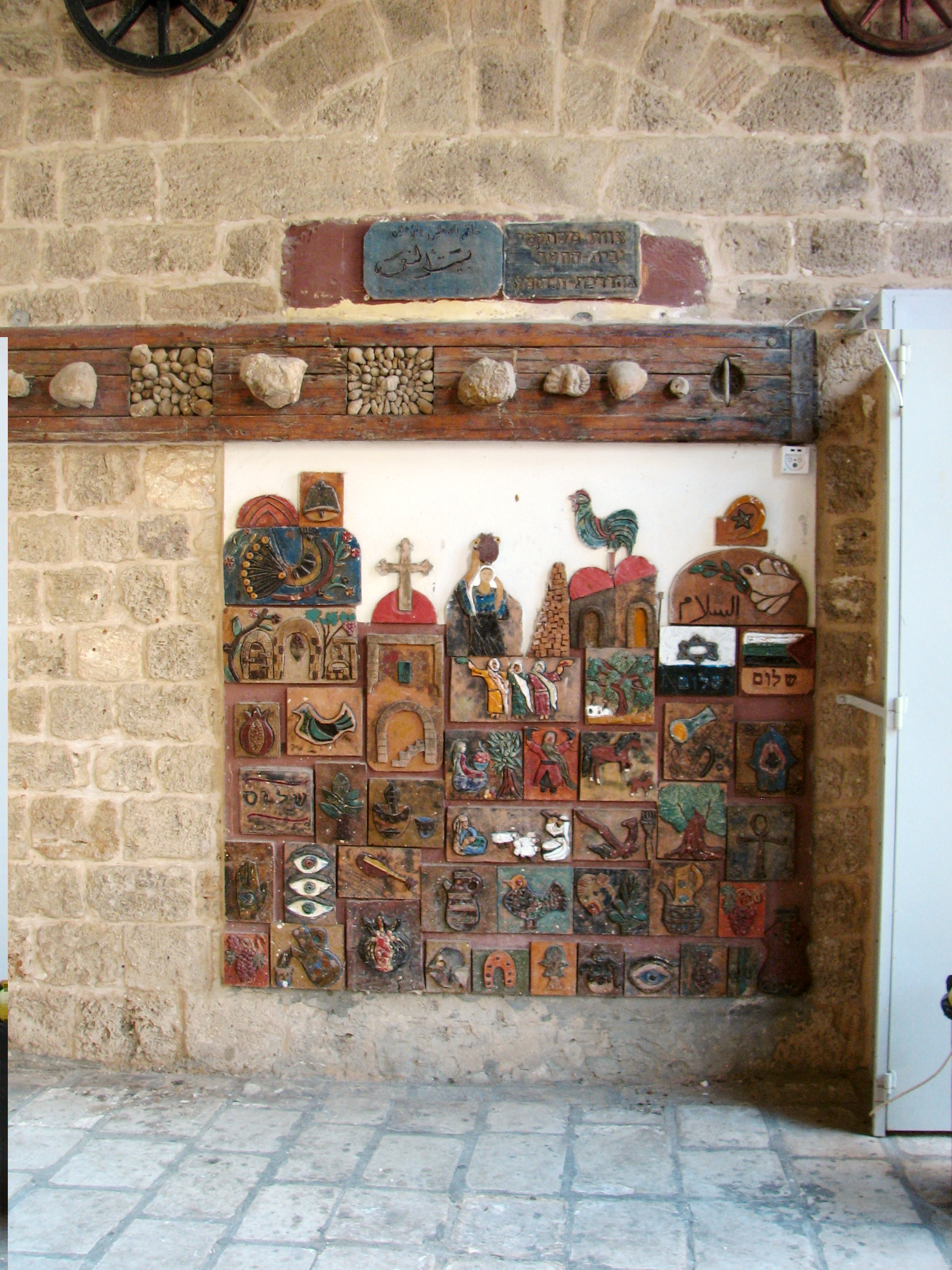 House of Grace, Haifa, Israel הכנסייה היוונית-קתולית הקימה בשנת 1859 כנסייה בשם "א-סיידה". היום משמש הבית מוסד שיקומי לאסירים משוחררים ובית מחסה לנשים נזקקות שוכן בשדרות הפלי"ם בעיר התחתית בחיפה תבליט קרמיקה שהוכן על ידי חיה תומא. מוקדש לבית החסד